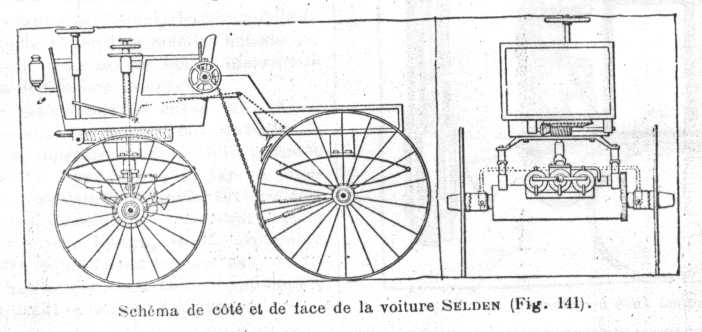 Selden Road engine (1877). Cette voiture avec moteur Brayton-Selden était la base pour le Brevet universel Selden de 1895 pour automobiles avec moteurs à explosion malgré d'une fonction insufficiente.